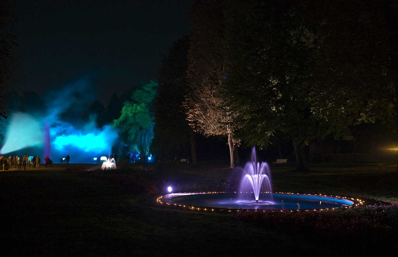 Illumina 2010 im Kurpark